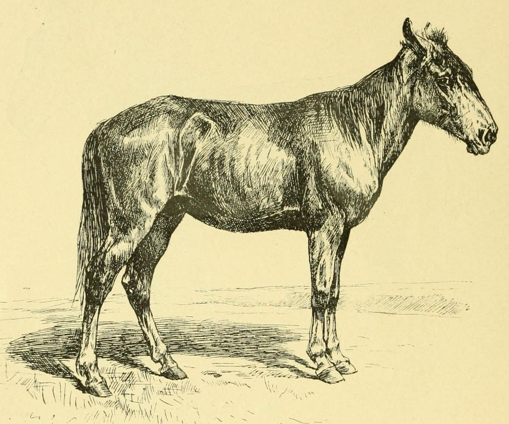 Les races chevalines : avec une étude spéciale sur les chevaux russes /